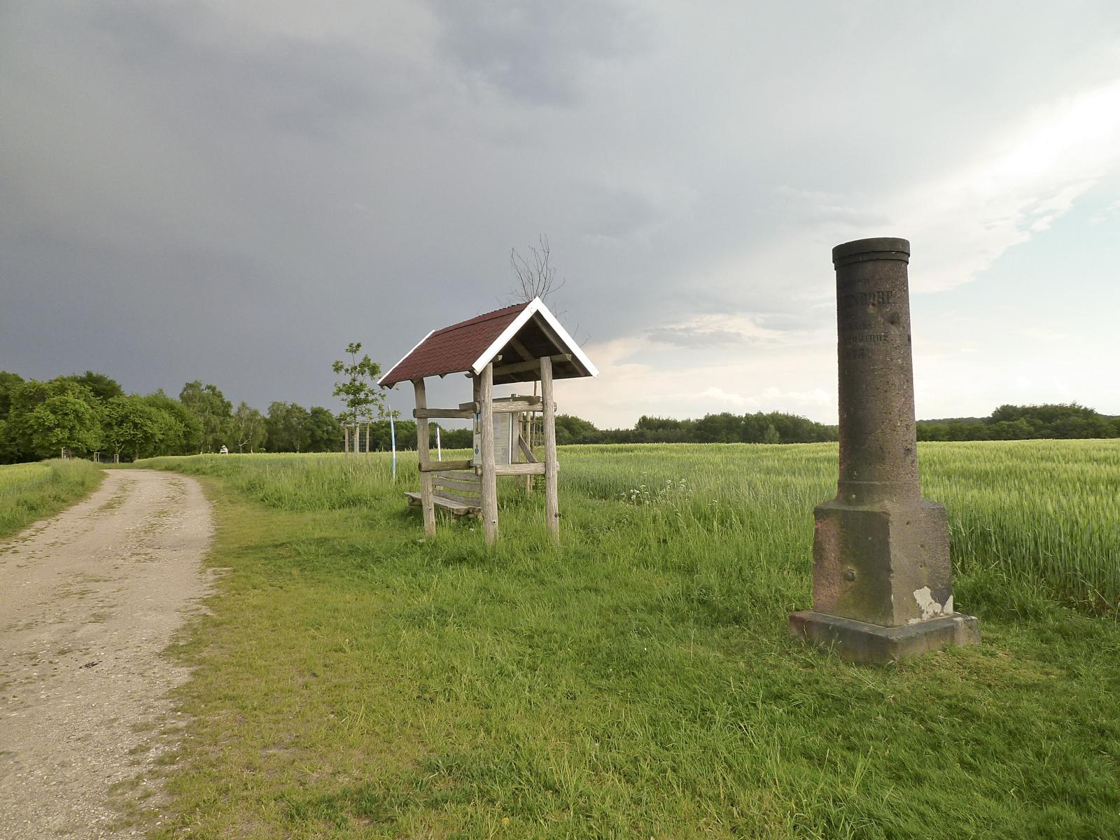 Triangulationssäule, Station 108 Ballendorf, Vermessungspunkt II. Ordnung, Thierbaumer Weg in Ballendorf. Text: Station BALLENDORF der Kön: Sächs: Triangulirung. 1875